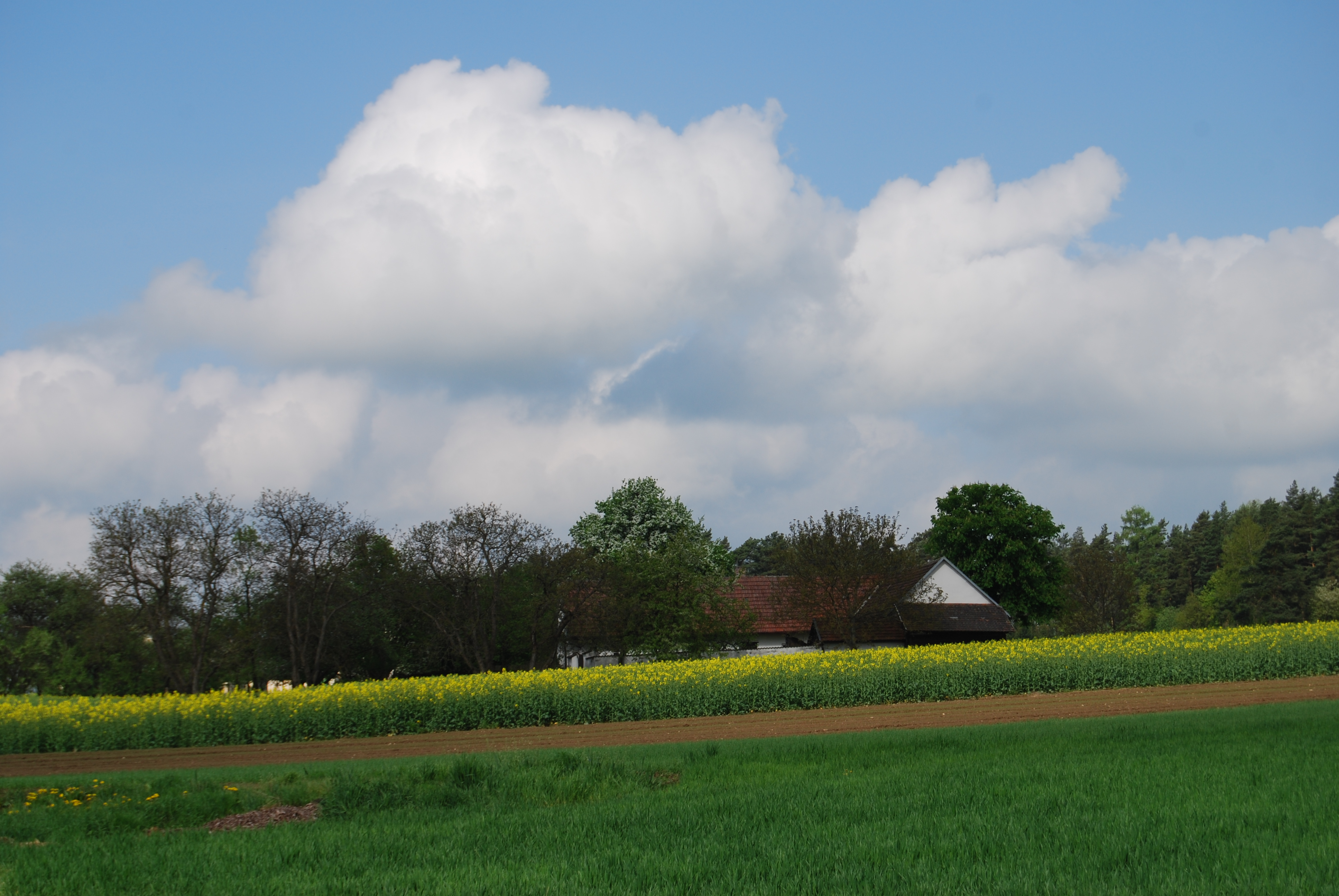 Pohled na část osady. Ráb je osada, část obce Bernartice v okrese Písek. Česká republika.